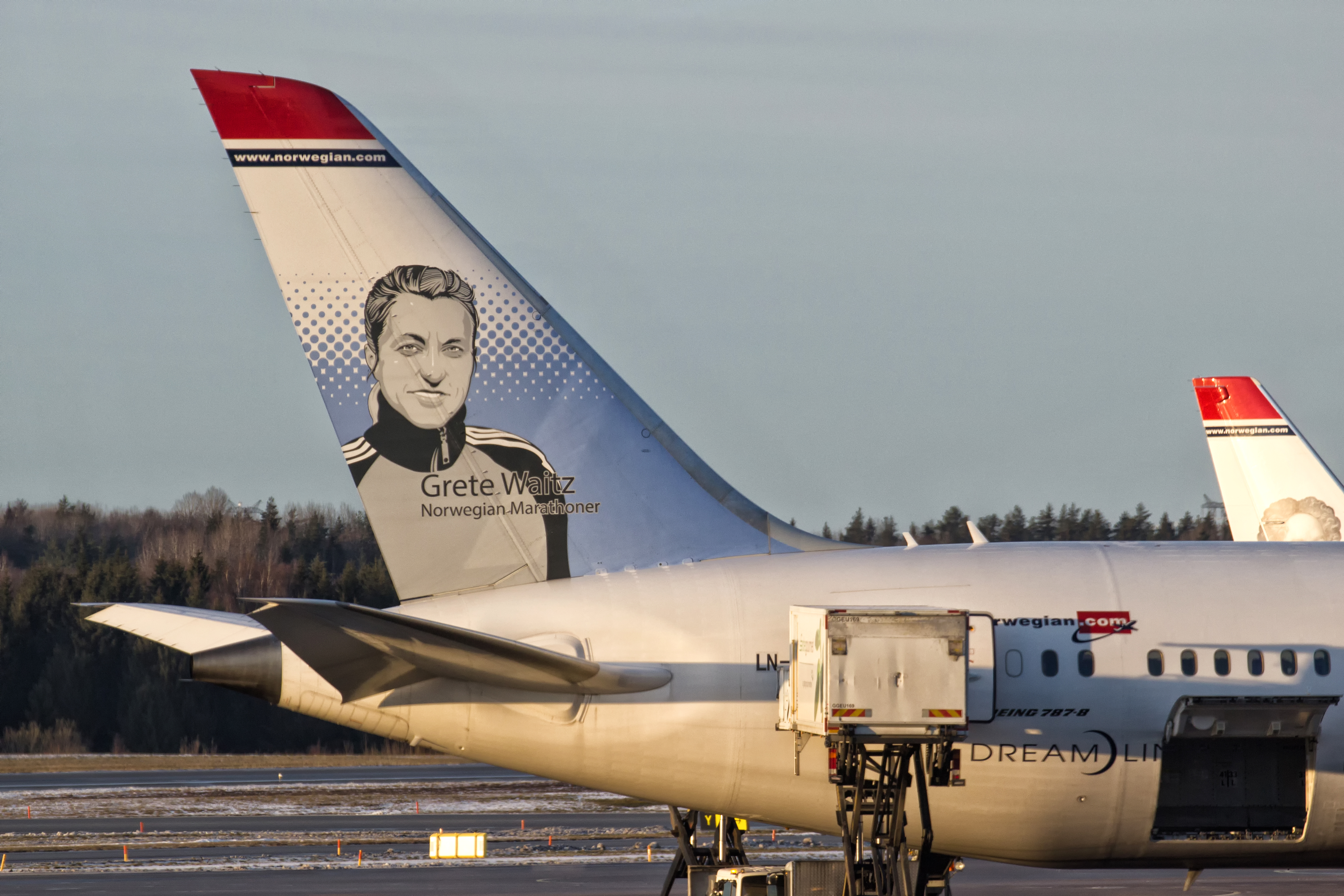 Deriva dun Boeing 787 de Norwegian dedicada á corredora norueguesa Grete Waitz no aeroporto de Estocolmo-Arlanda.